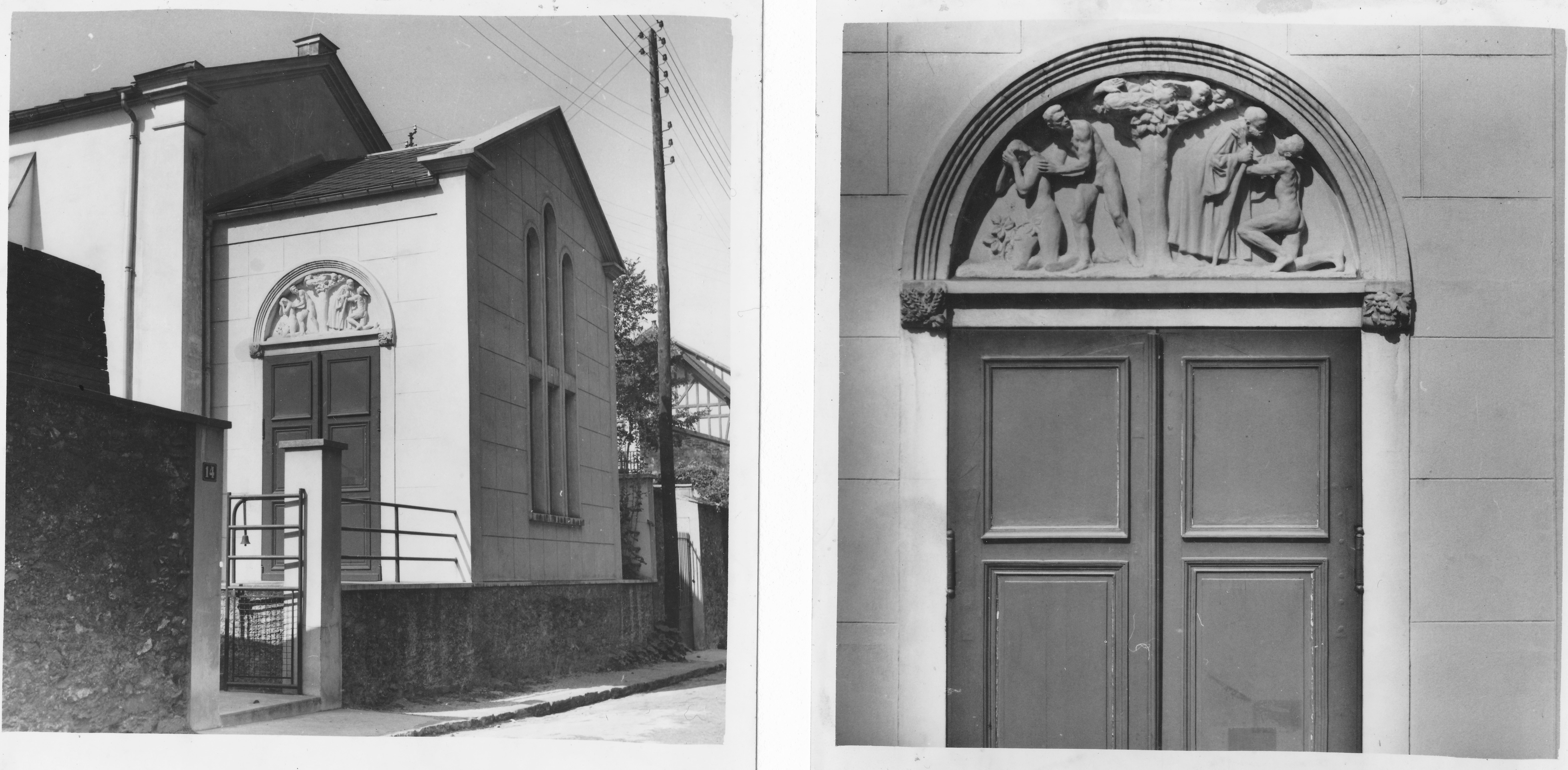 Adam et Eve chassés du paradis, Le fils prodigue : haut-relief en pierre de Stéphan Buxin (1919-1996) au temple protestant de Meudon (Hauts-de-Seine, France).